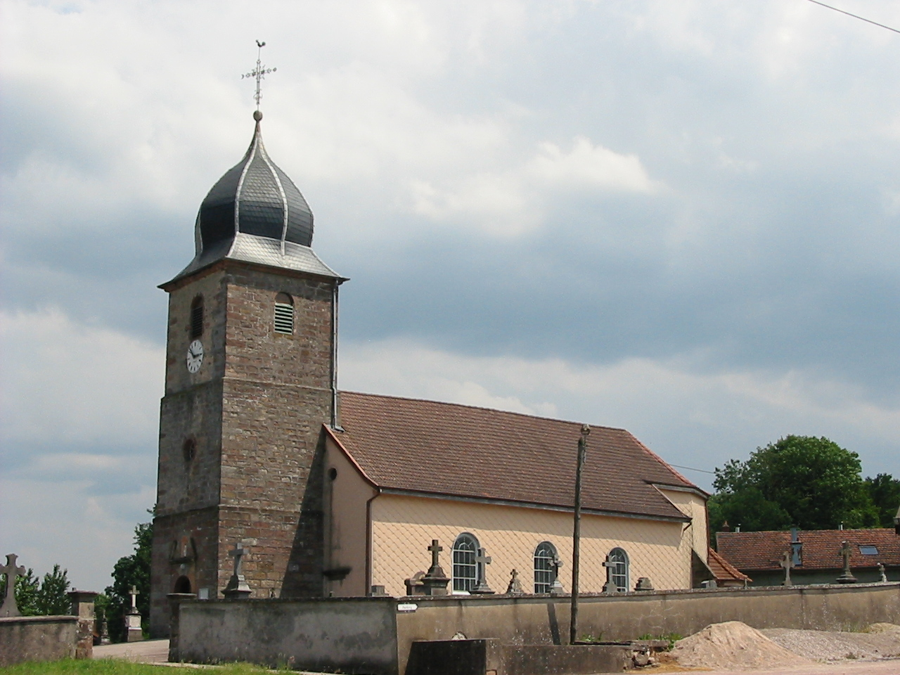 Pfarrkirche Sainte-Menne in La Chapelle-devant-Bruyères.